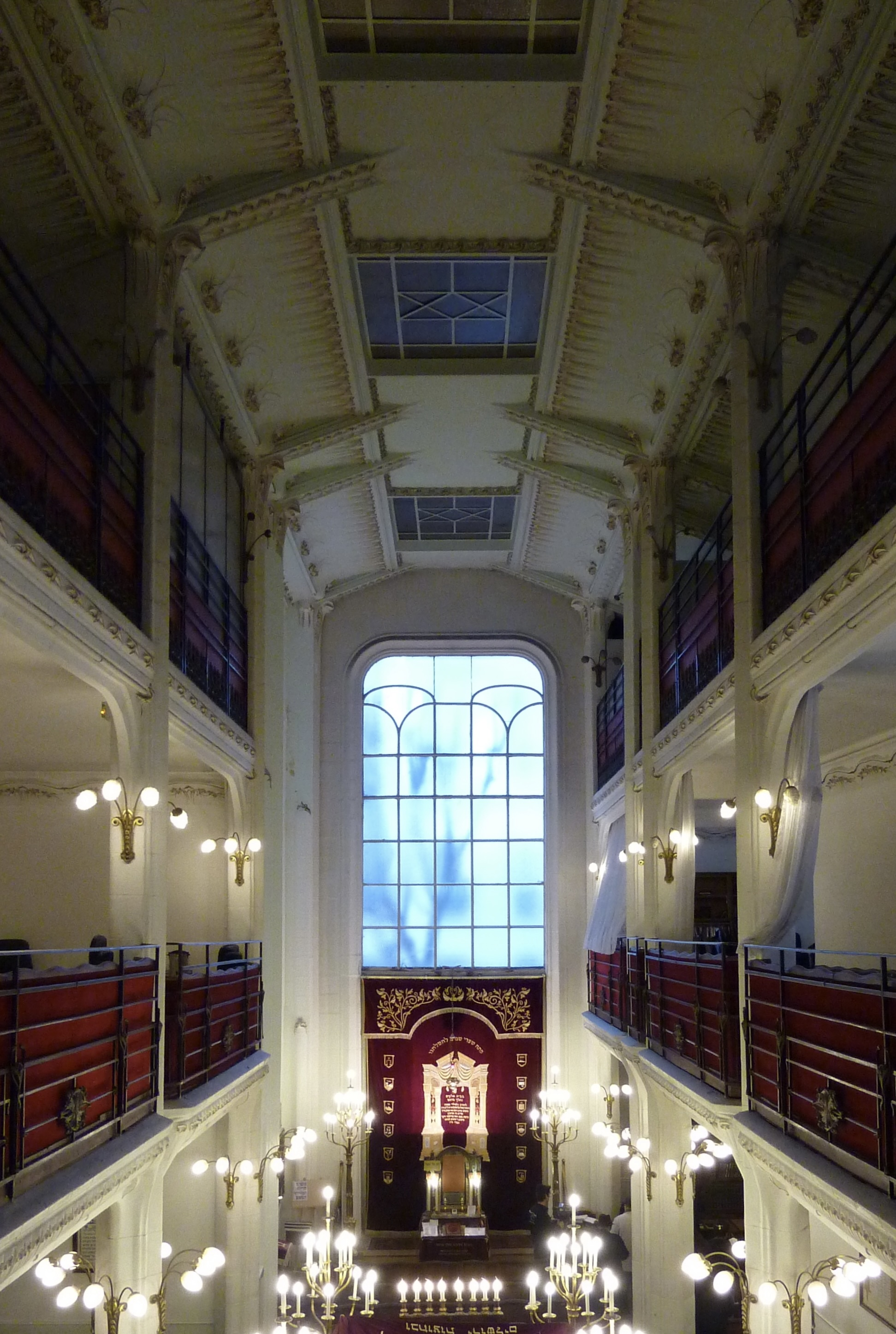 Synagoge in der Rue Pavée (Synagoge Agoudas Hakehilot) im 4. Arrondissement von Paris, Innenansicht